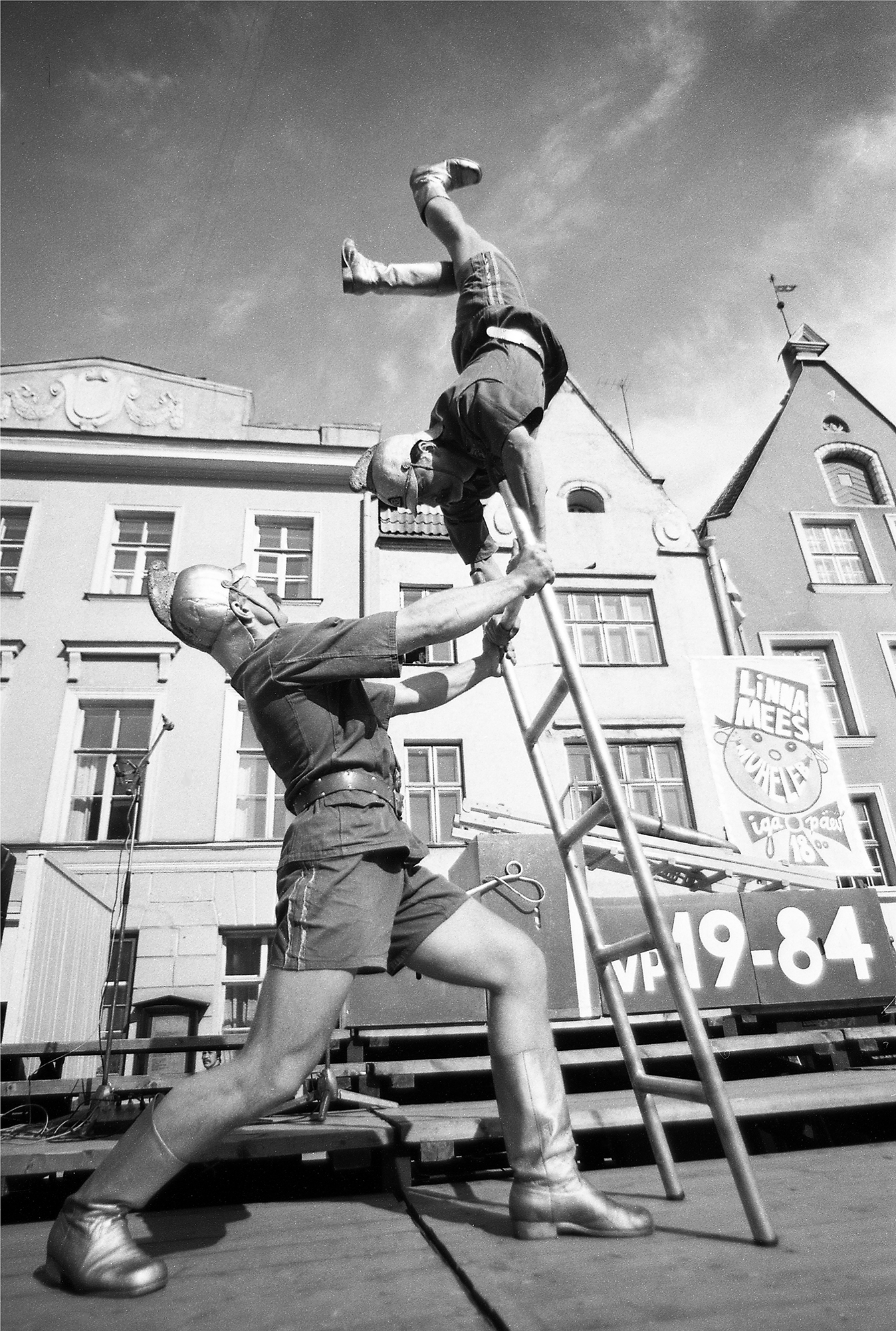 Jüri Druus ja Sergei Fatkin, koomikud, akrobaadid ja tsirkuseartistid vanalinna päevadel 84